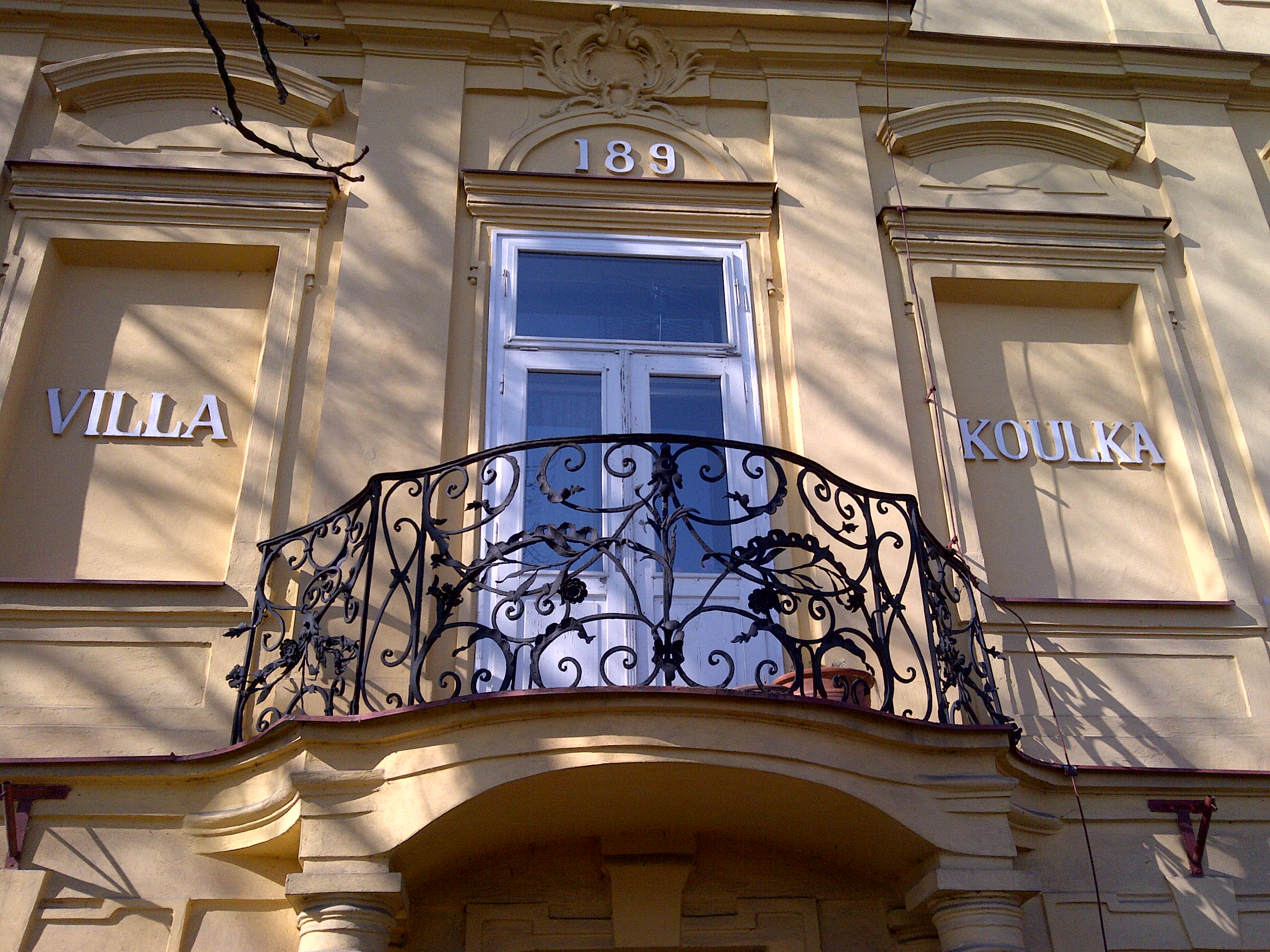 Usedlost Koulka, Praha 5-Smíchov, Křížová, Koulka 189/37